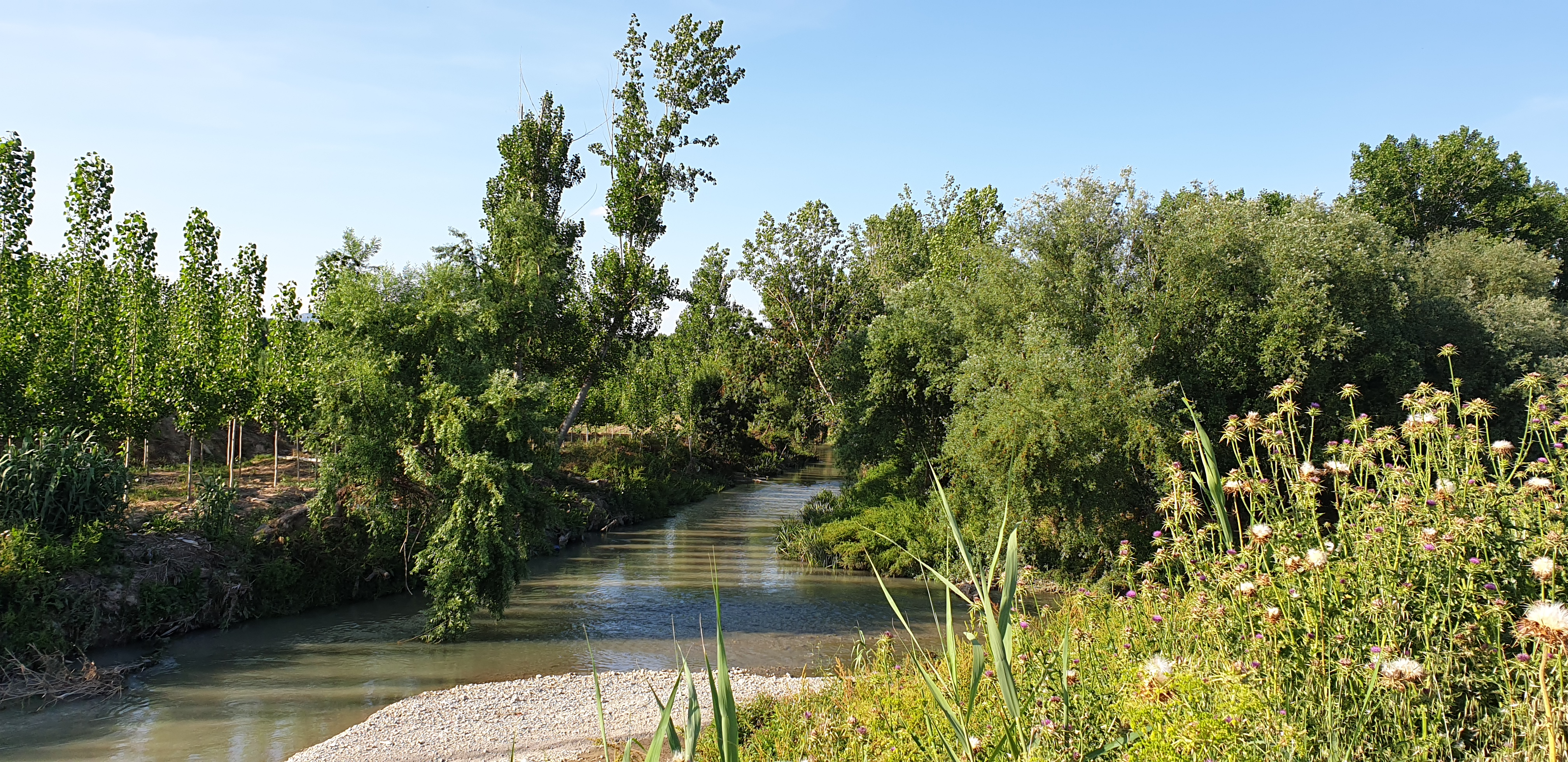 Desembocadura del río Cubillas (arriba) en el río Genil (abajo), término municipal de Fuente Vaqueros (provincia de Granada, España)